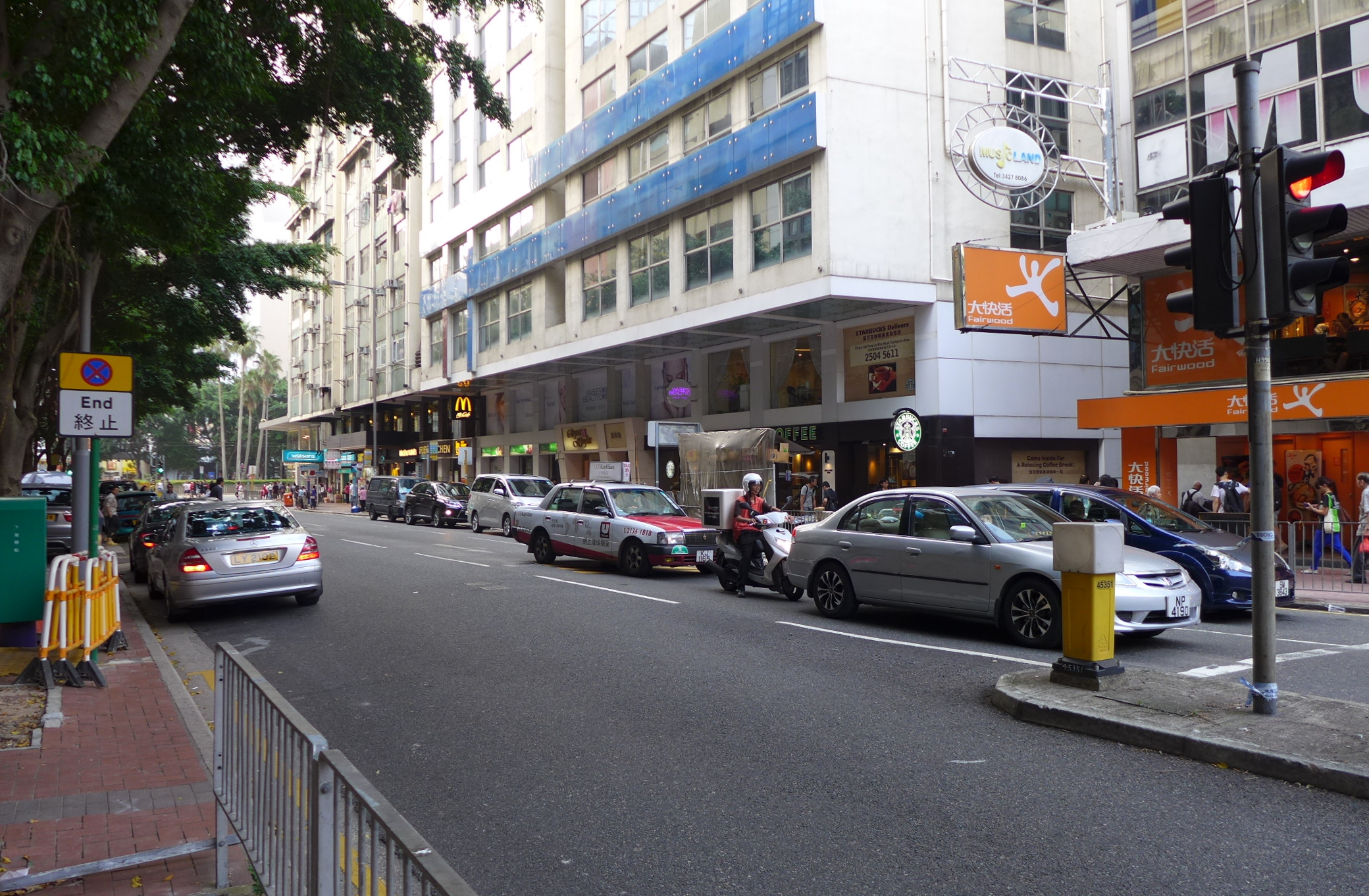 Tung Lo Wan Road 銅鑼灣道